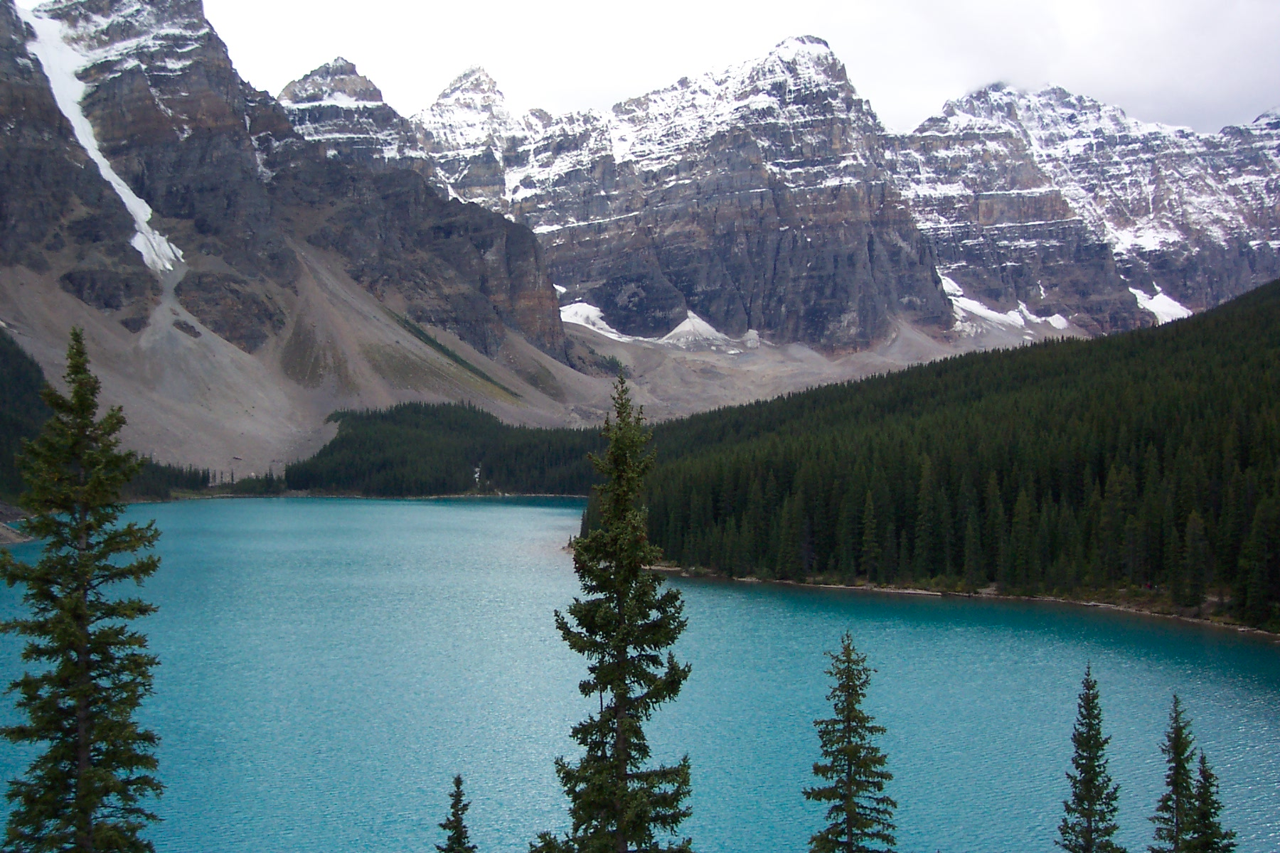 Moraine Lake in Banff National Park, personnal photo, free license picture